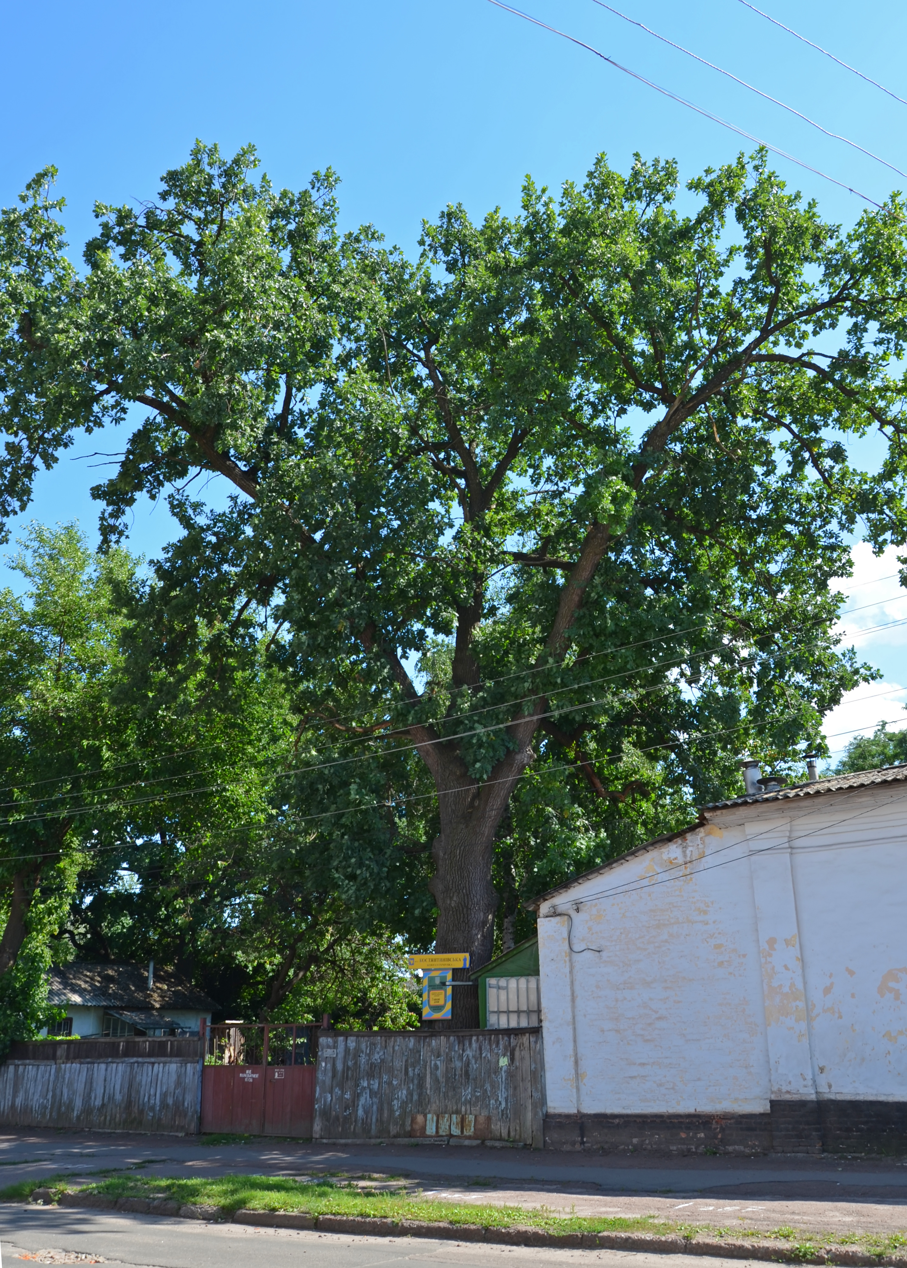 Два вікових дуби, Прилуцький район, м. Прилуки, вул. Костянтинівська, 106